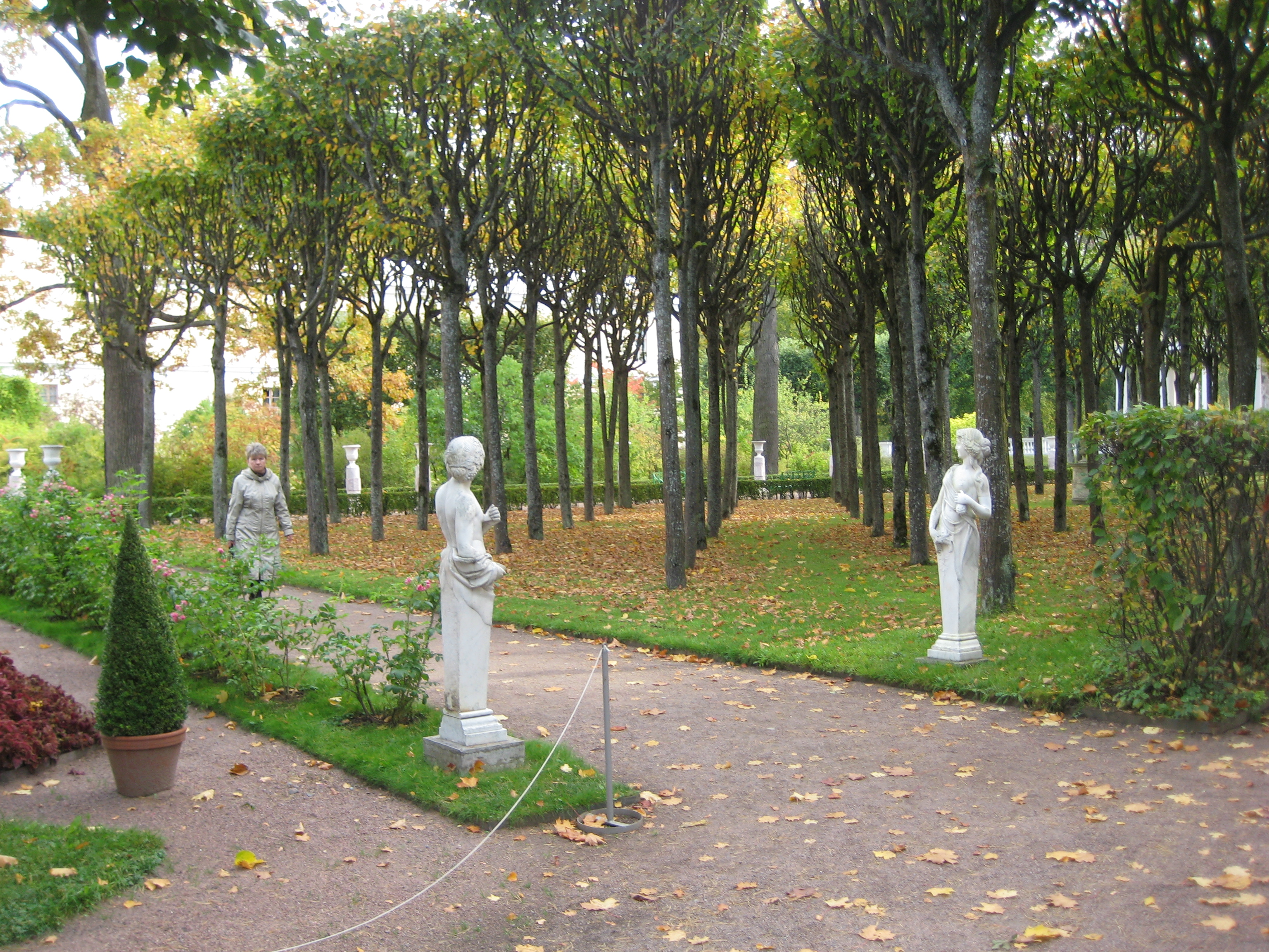 Павловский парк. Собственный садик. Гермы